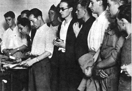 Voluntarios inscribíndose ás Milicias Galegas no local do Partido Galeguista en Madrid. 1936